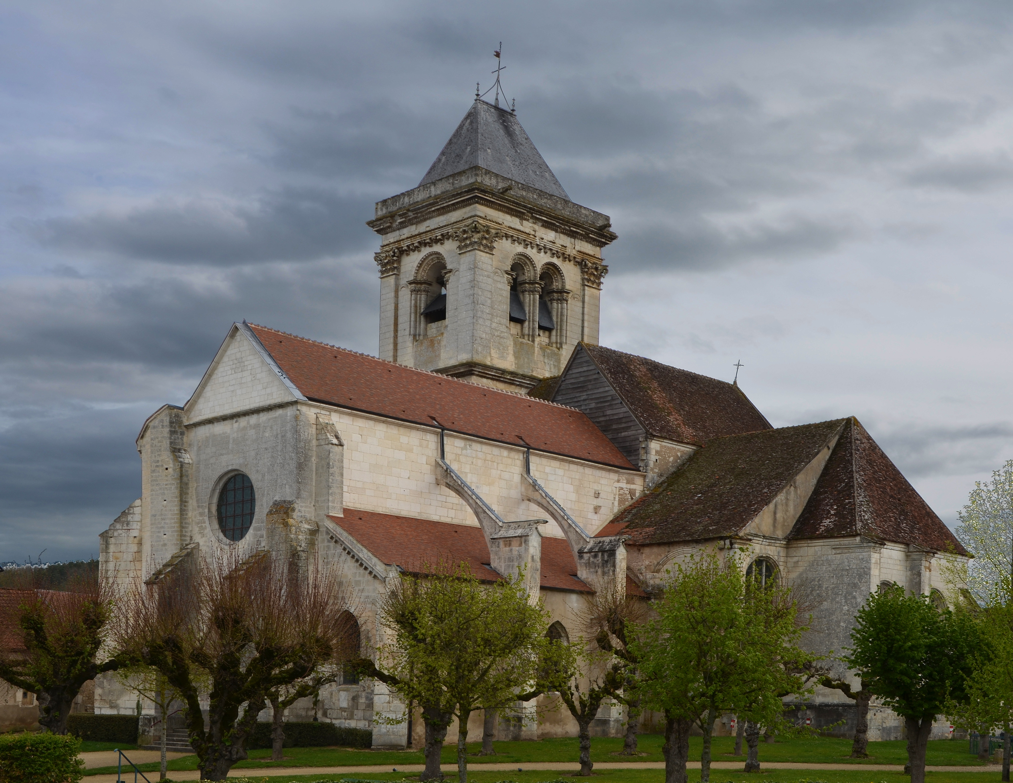 Eglise de Cravant, Yonne, France